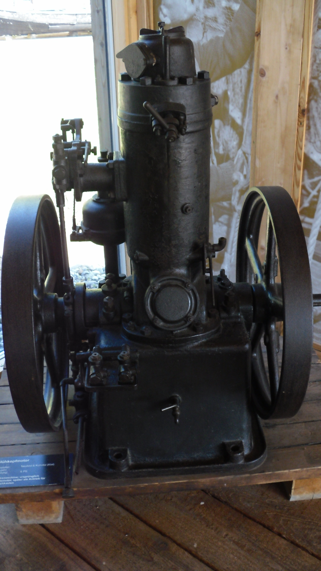 Glühkopfmotor mit 6 PS zum Bootsantrieb, später umgebaut zum Antrieb einer Dreschmaschine